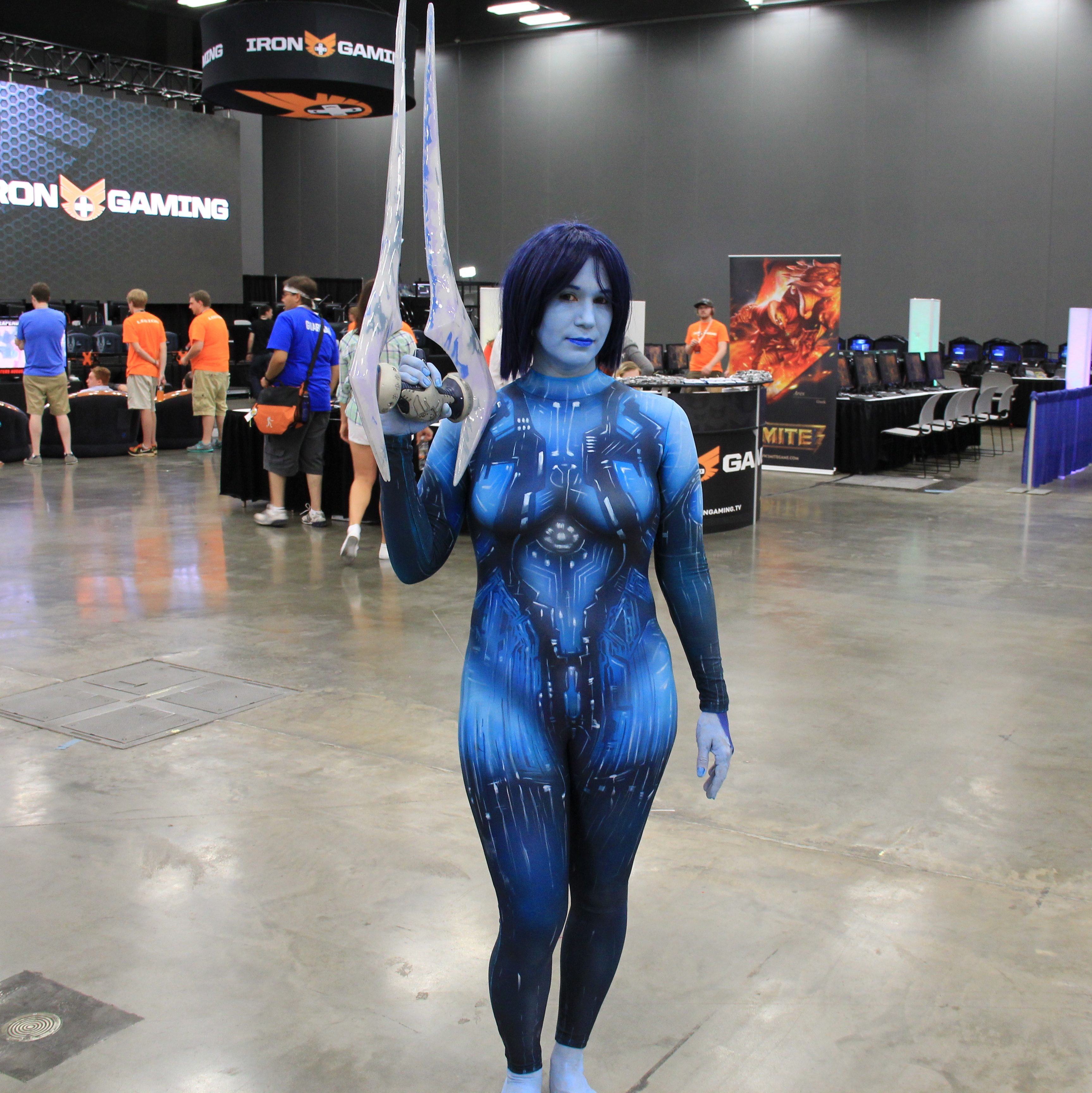 Cortana Taken at RTX 2014.